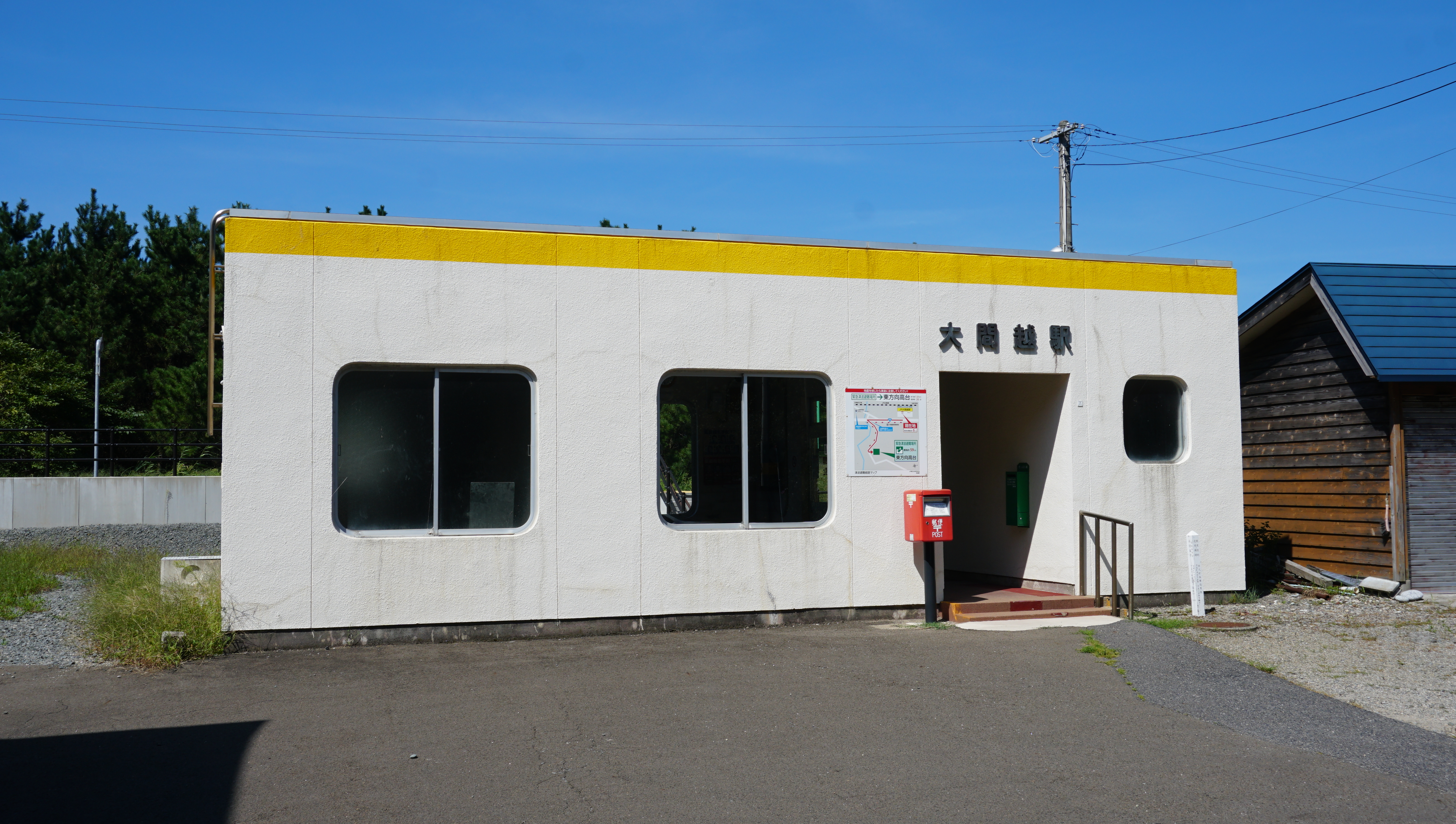 五能線 大間越駅（青森県西津軽郡深浦町）